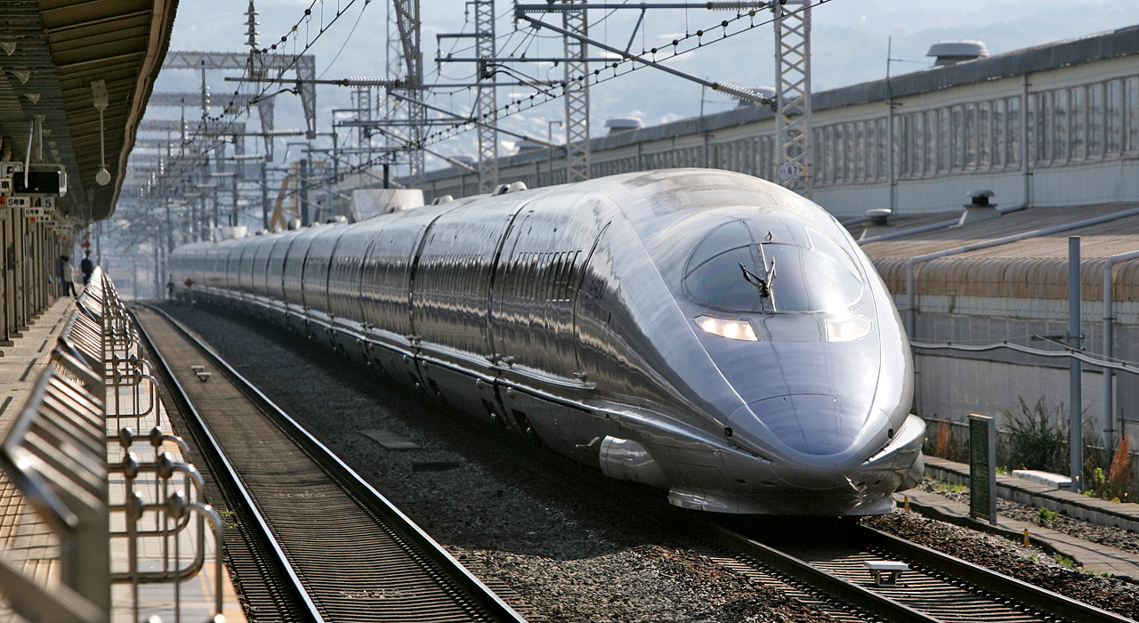 JR West 500 series Shinkansen train passes Mishima Station, Tokaido Shinkansen.